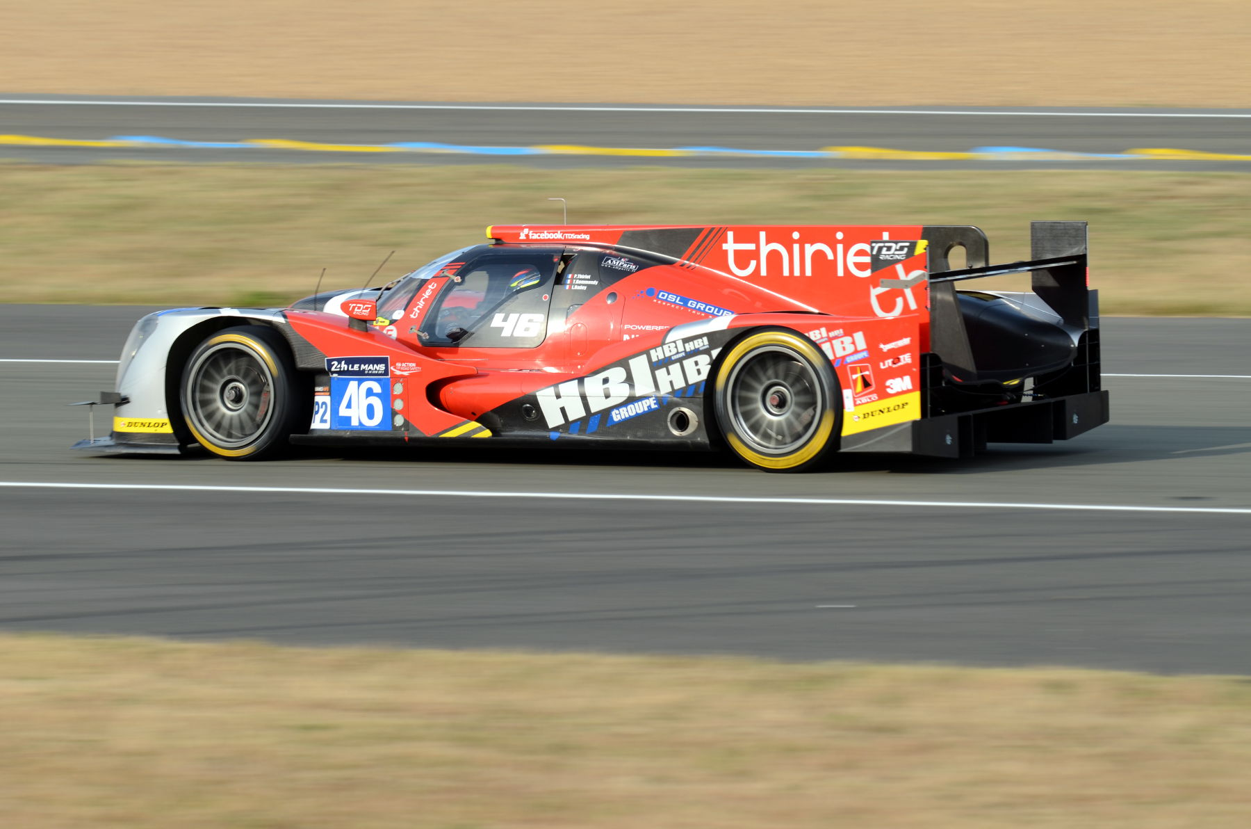 L'Oreaca 05- Nissan de l'écurie Thiriet by TDS Racing pilotée par Pierre Thiriet, Ludovic Badey et Tristan Gommendy lors des 24 Heures du Mans 2018